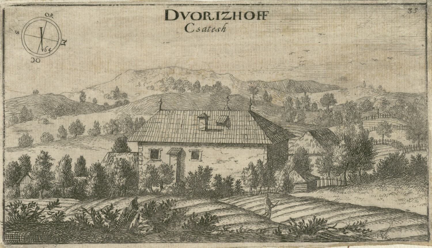 Dvorec Dvorice (Dvorizhoff)